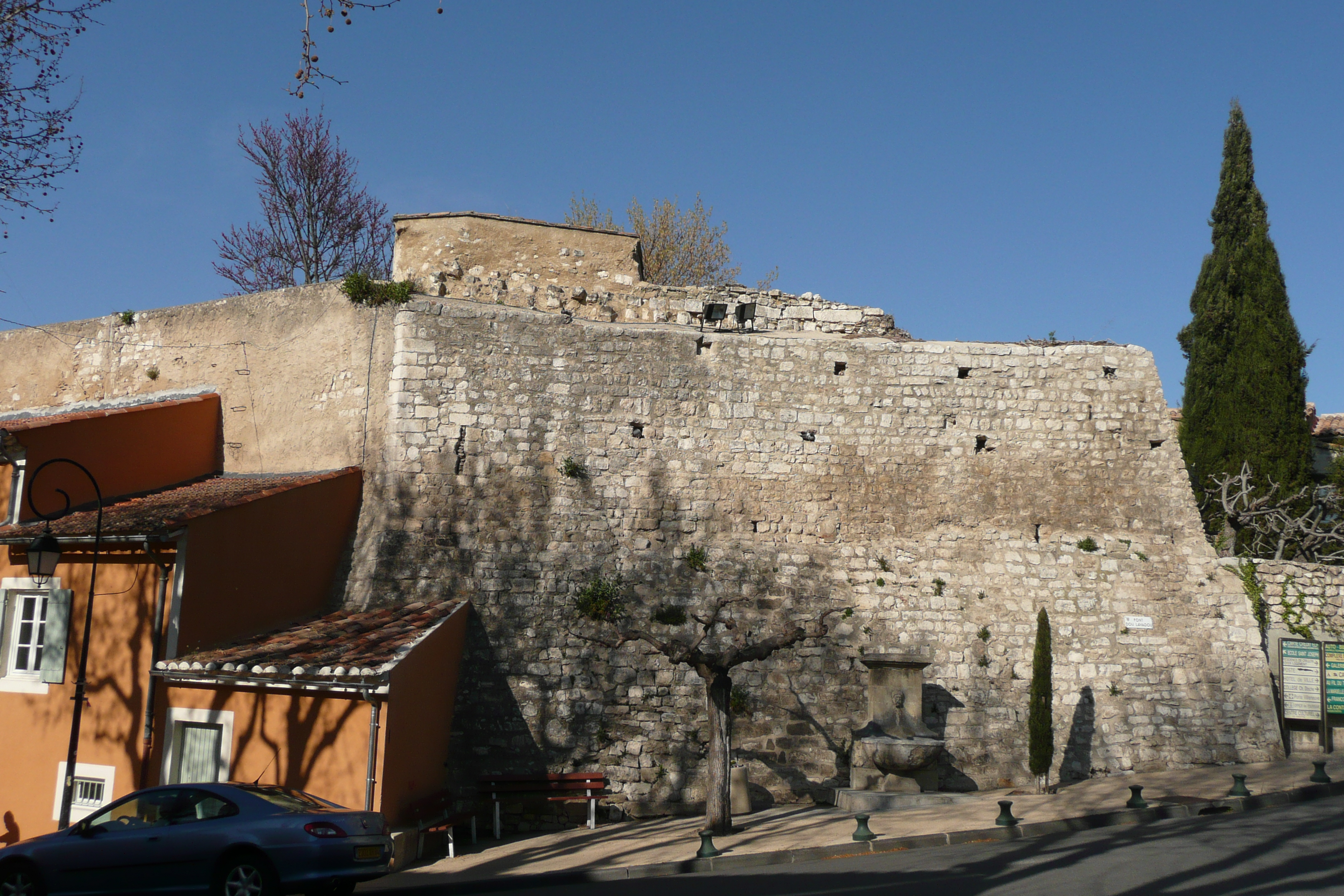 Fontaine Font du Lavadou à Pernes-les-Fontaines